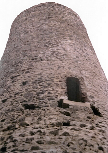 Věž zříceniny hradu Volfštejna s románským portálem z první poloviny 13. století. Foceno v dubnu 2005.